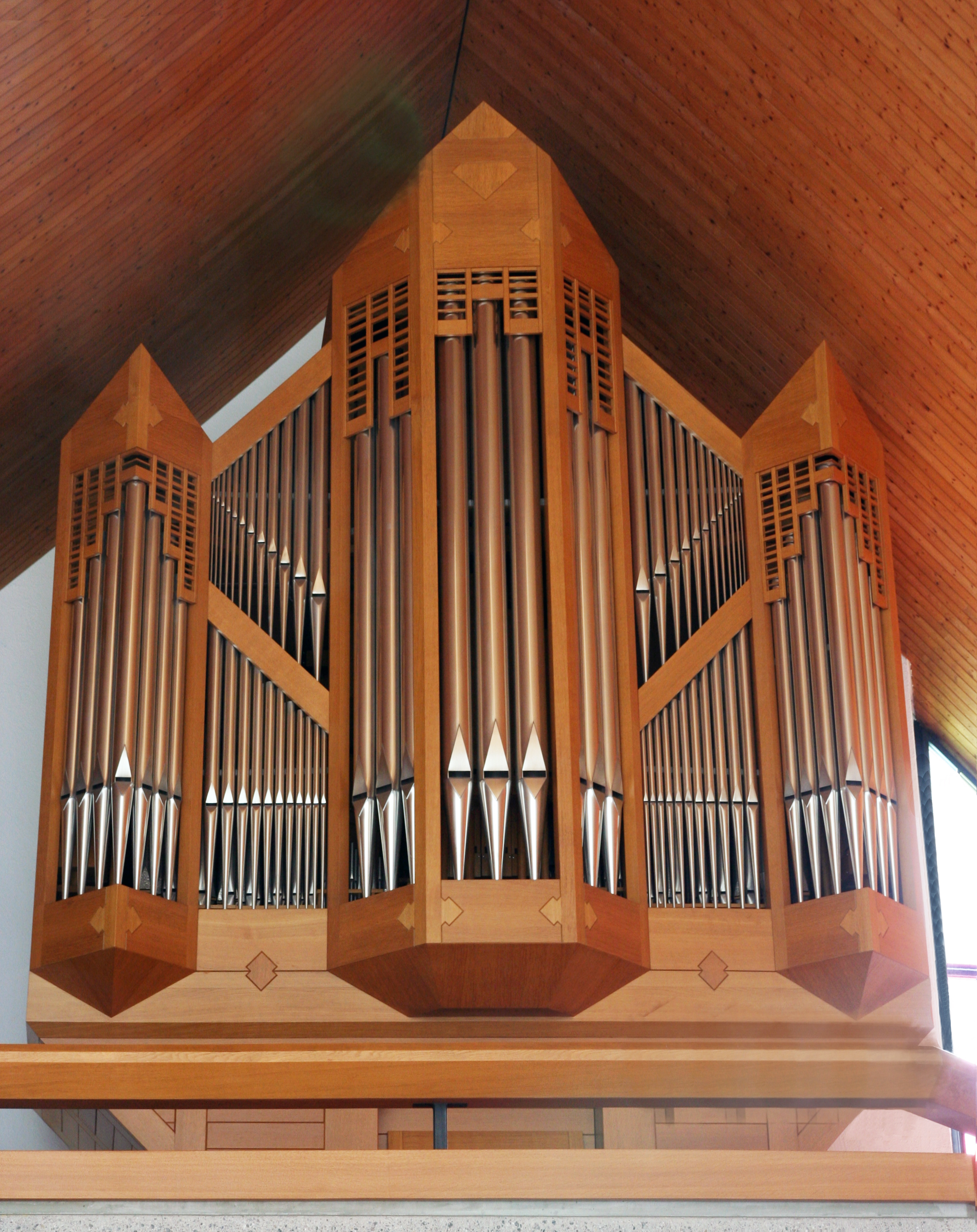 Römisch-katholische Pfarrkirche Hl. Familie Schönenberg ZH